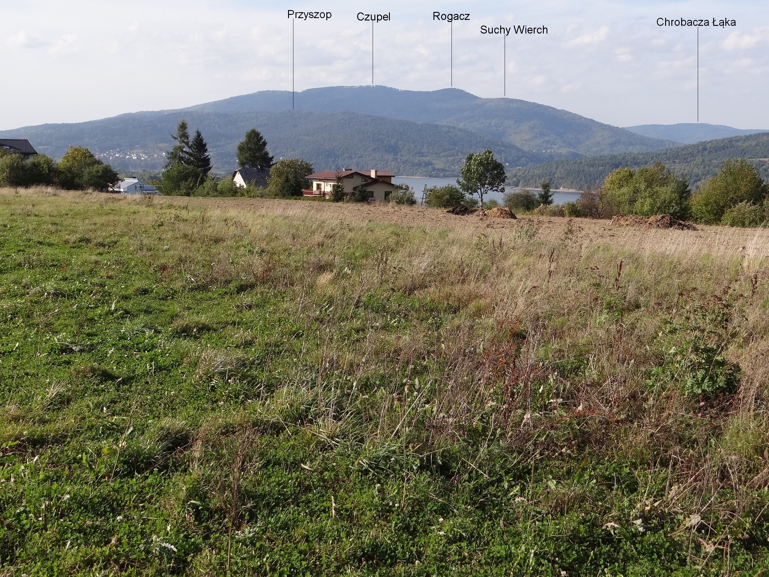 Widok z Działów Zadzielskich nad Jeziorem Żywieckim